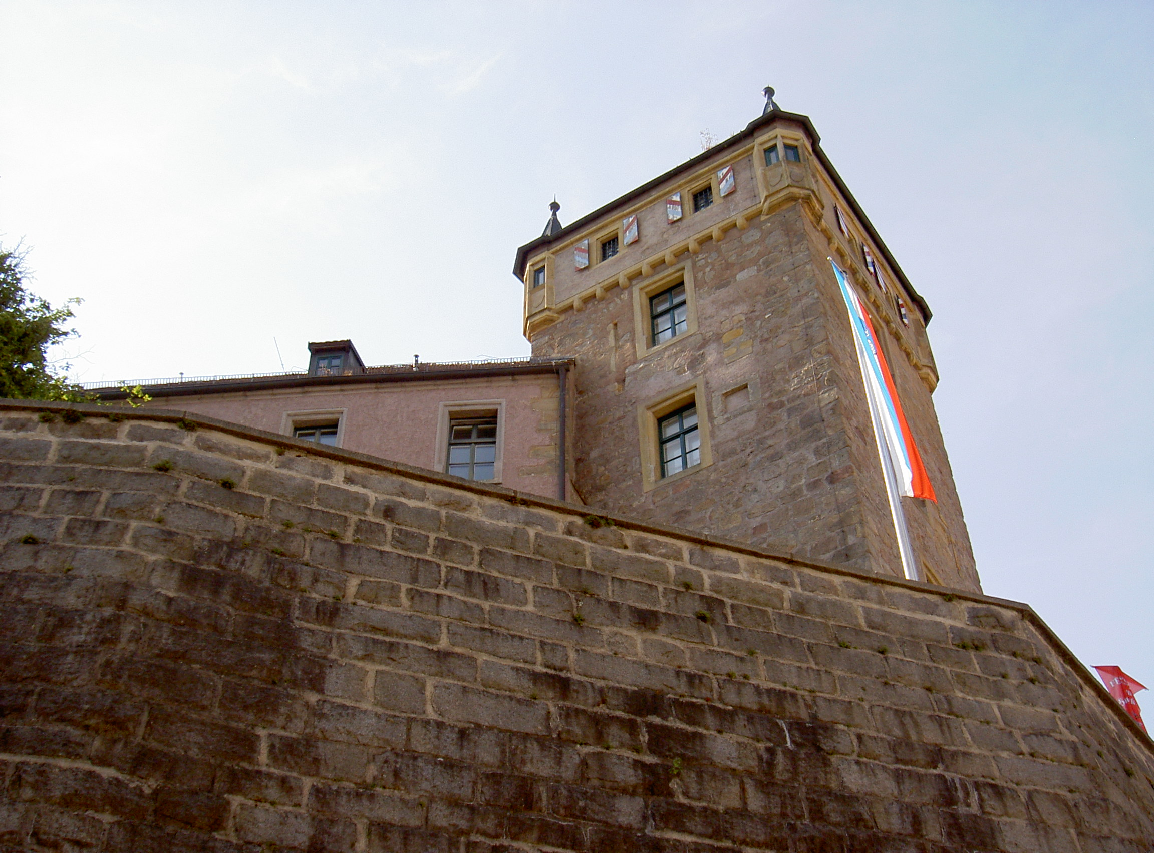 Neunburg vorm Wald, Hauptstraße, Burgmauer